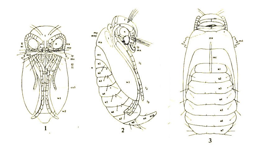 Pupae of Mnemonica auricyanea (cropped from plate 9) Fig. 1. Mnemonica auricyanea, ventral view, male. Fig. 2. Mnemonica auricyanea, lateral view, female. Fig. 3. Mnemonica auricyanea, dorsal view, female.